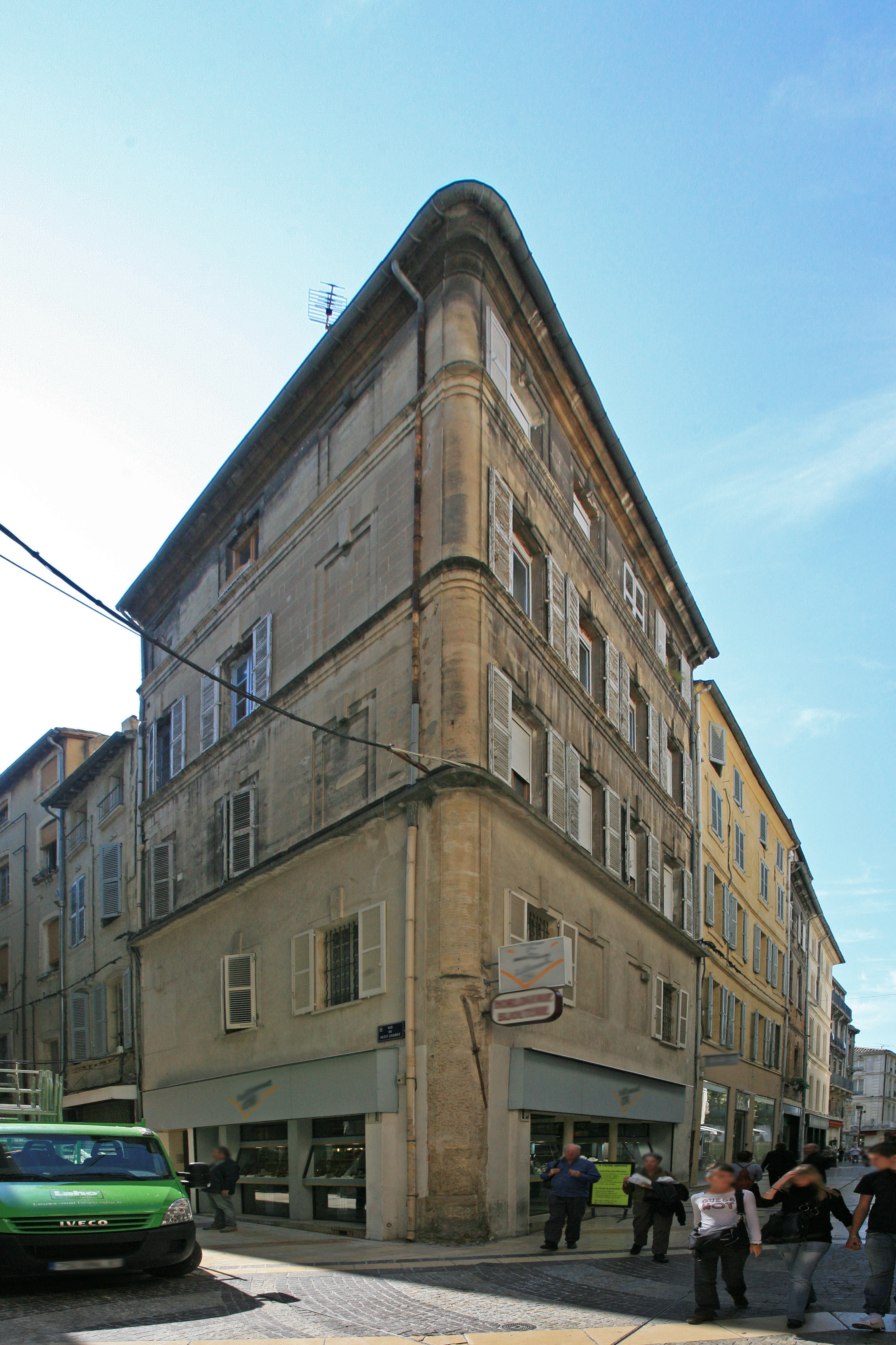 Ancienne boutique de Datini, à l'angle de la rue des Marchands et de la rue du Petit-Change, Avignon, Vaucluse, France.